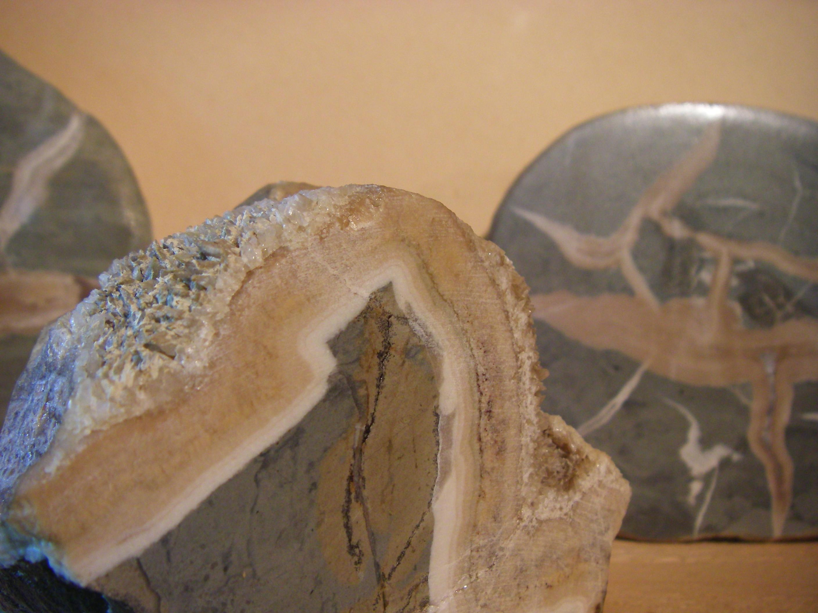 Vito Piombini, sculture. Pietra. Museo dell'Acqua e del Mulino, Caprese Michelangelo (AR)